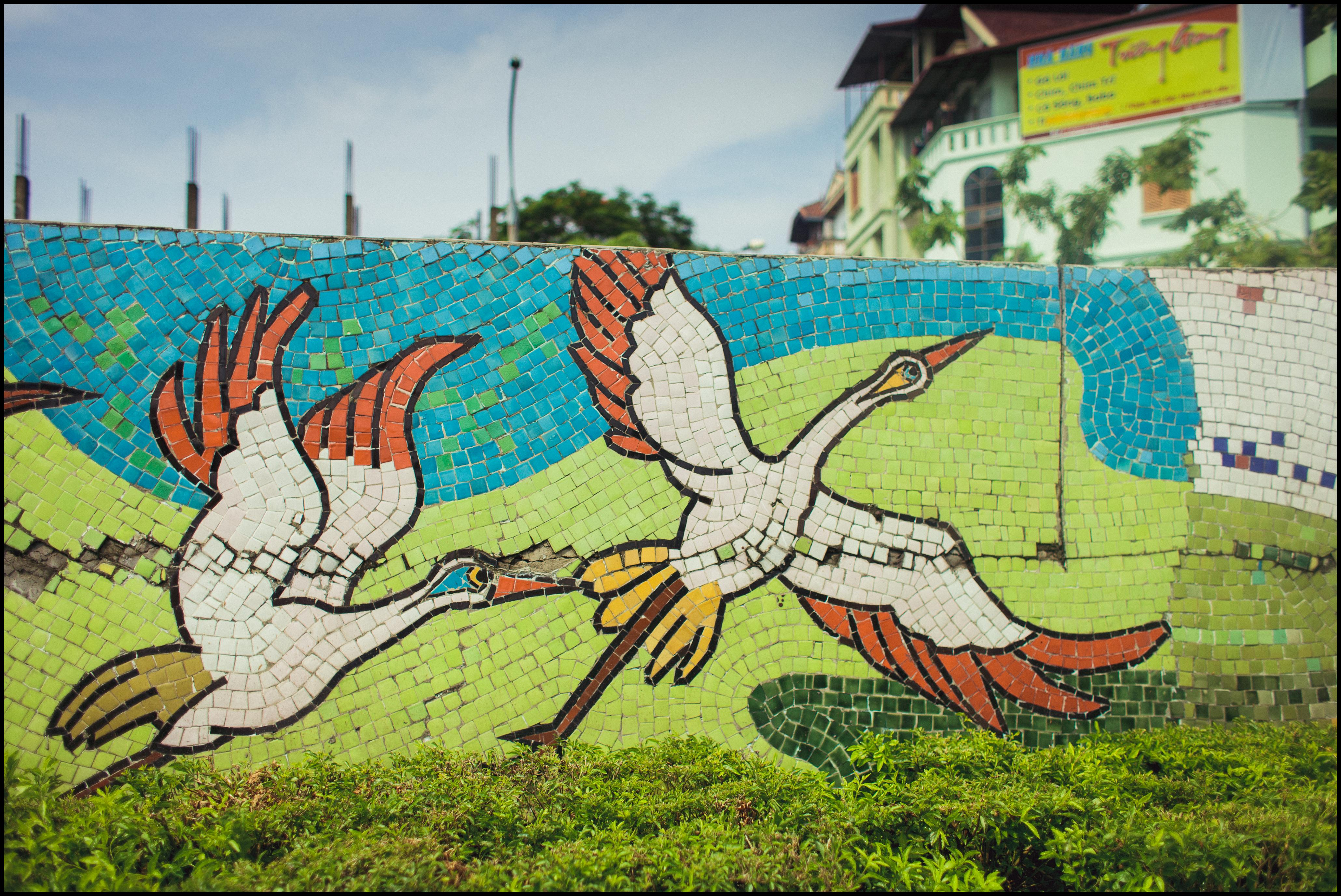 Hanoi, Vietnam